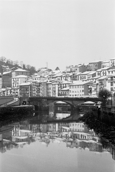 Ondarru ispiluan